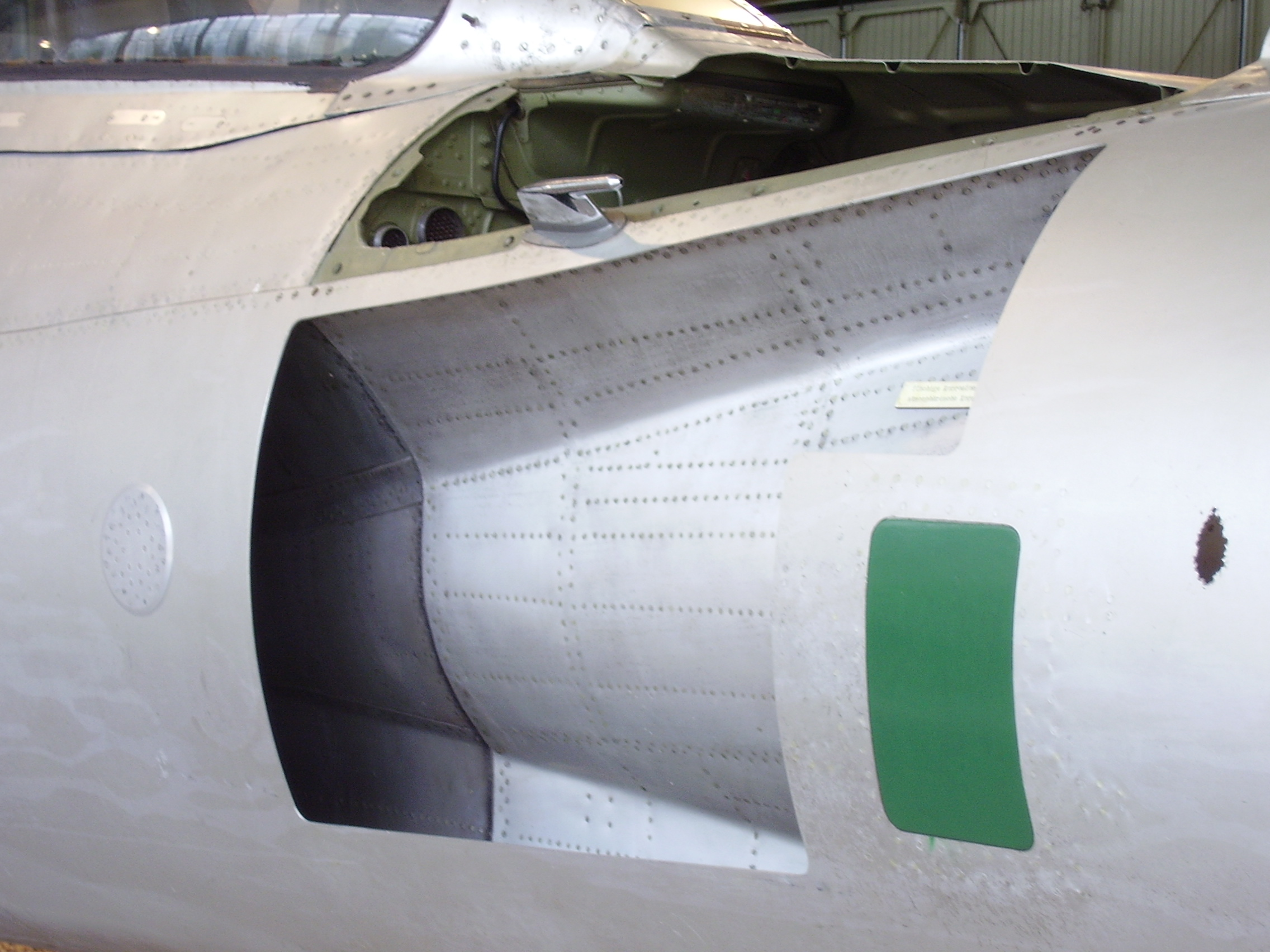 Luftwaffenmuseum der Bundeswehr; Airforce Museum of the Bundeswehr; Berlin-Gatow